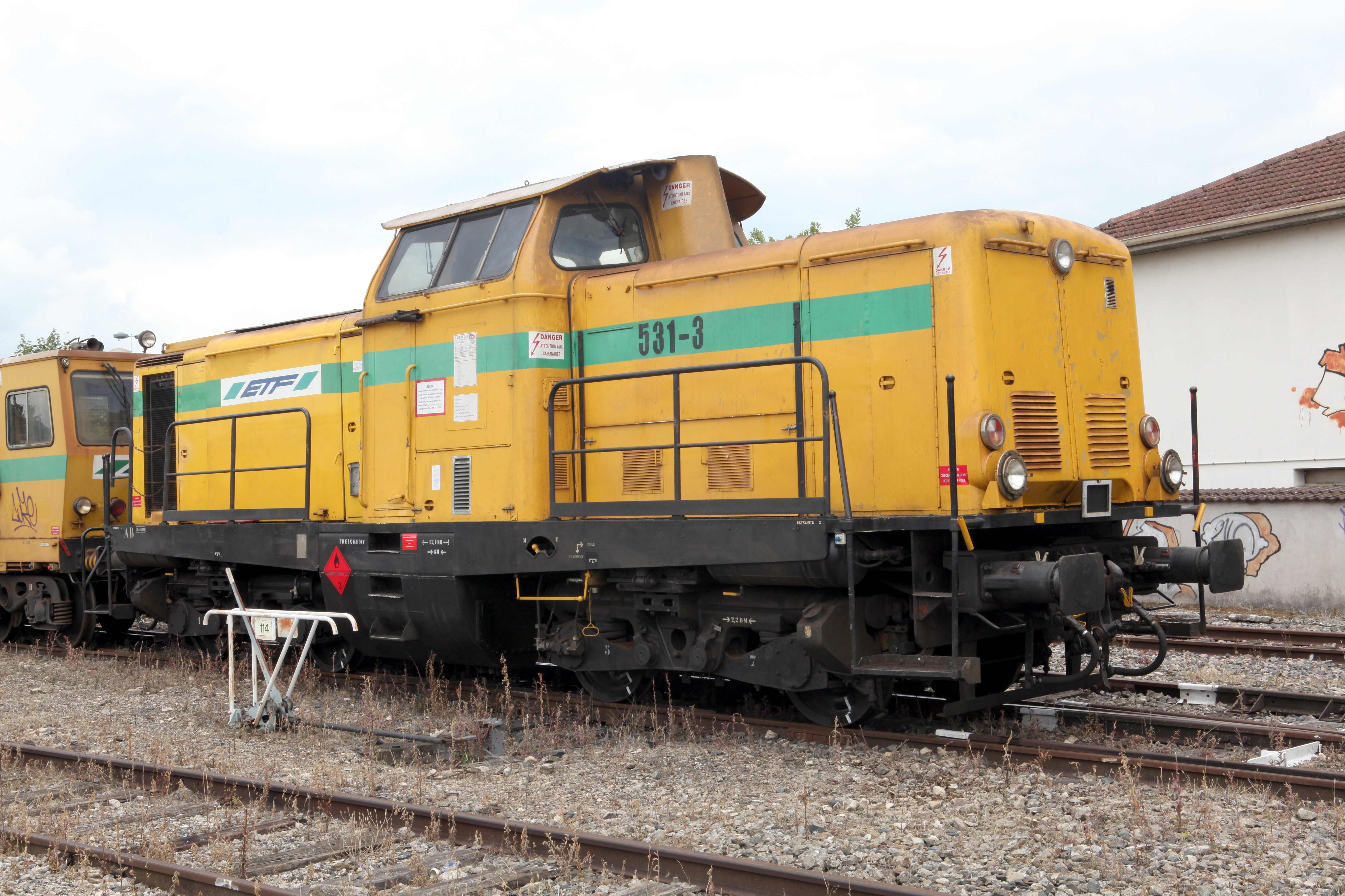 SNCF V 211 / ETF (Européenne de Travaux Ferroviaires SA)